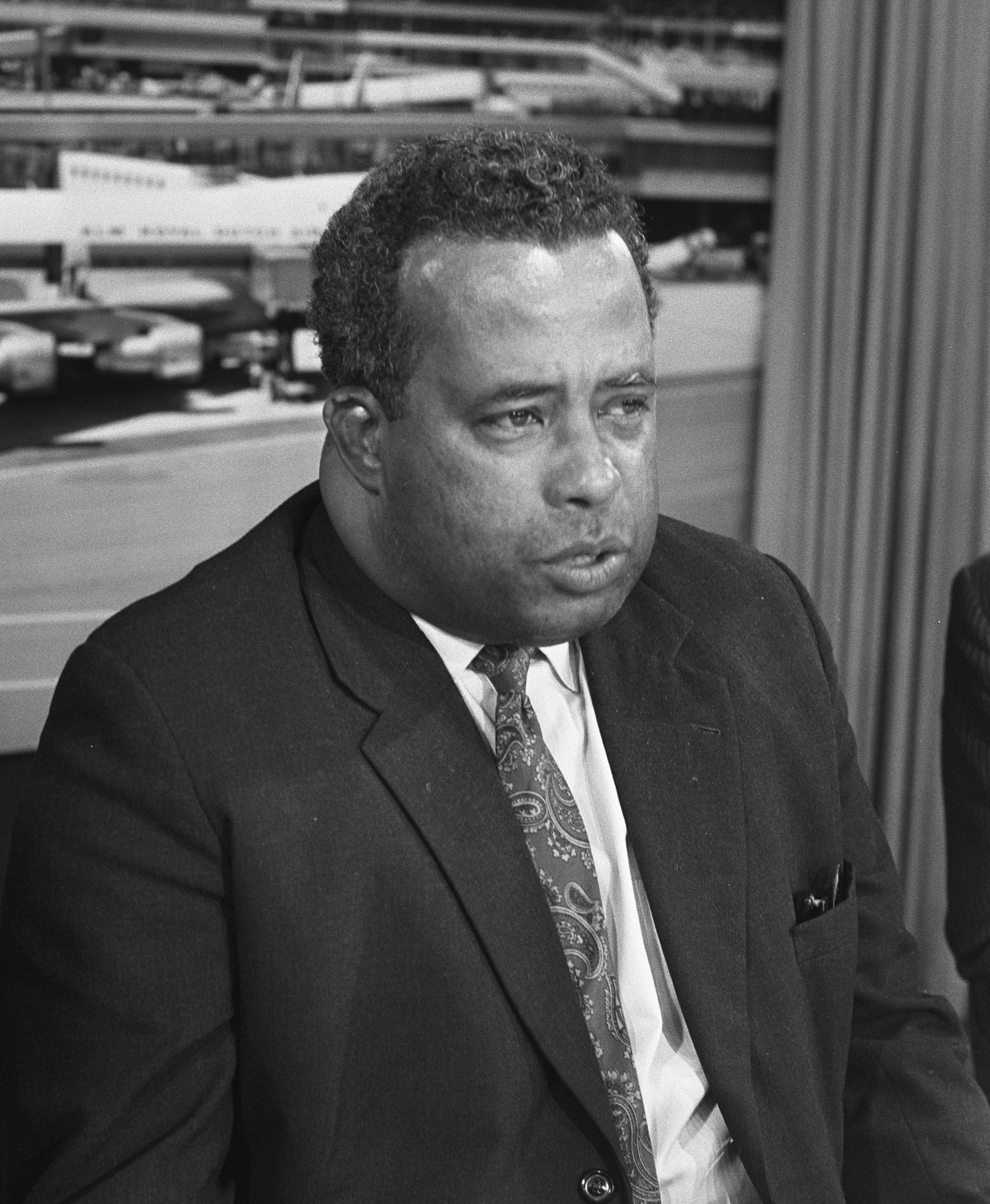 Collectie / Archief : Fotocollectie Anefo Reportage / Serie : [ onbekend ] Beschrijving : Premier Sedney van Suriname wordt op Schiphol begroet door Minister Geertsema, Sedney (kop) Datum : 3 januari 1973 Trefwoorden : premiers Persoonsnaam : Geertsema, Molly, Sedney, Jules Fotograaf : Verhoeff, Bert / Anefo Auteursrechthebbende : Nationaal Archief Materiaalsoort : Negatief (zwart/wit) Nummer archiefinventaris : bekijk toegang 2.24.01.05 Bestanddeelnummer : 926-1330